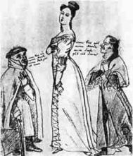 Annette von Droste-Hülshoff mit Heinrich Straube und August von Arnswaldt, zeitgenössische Karikatur